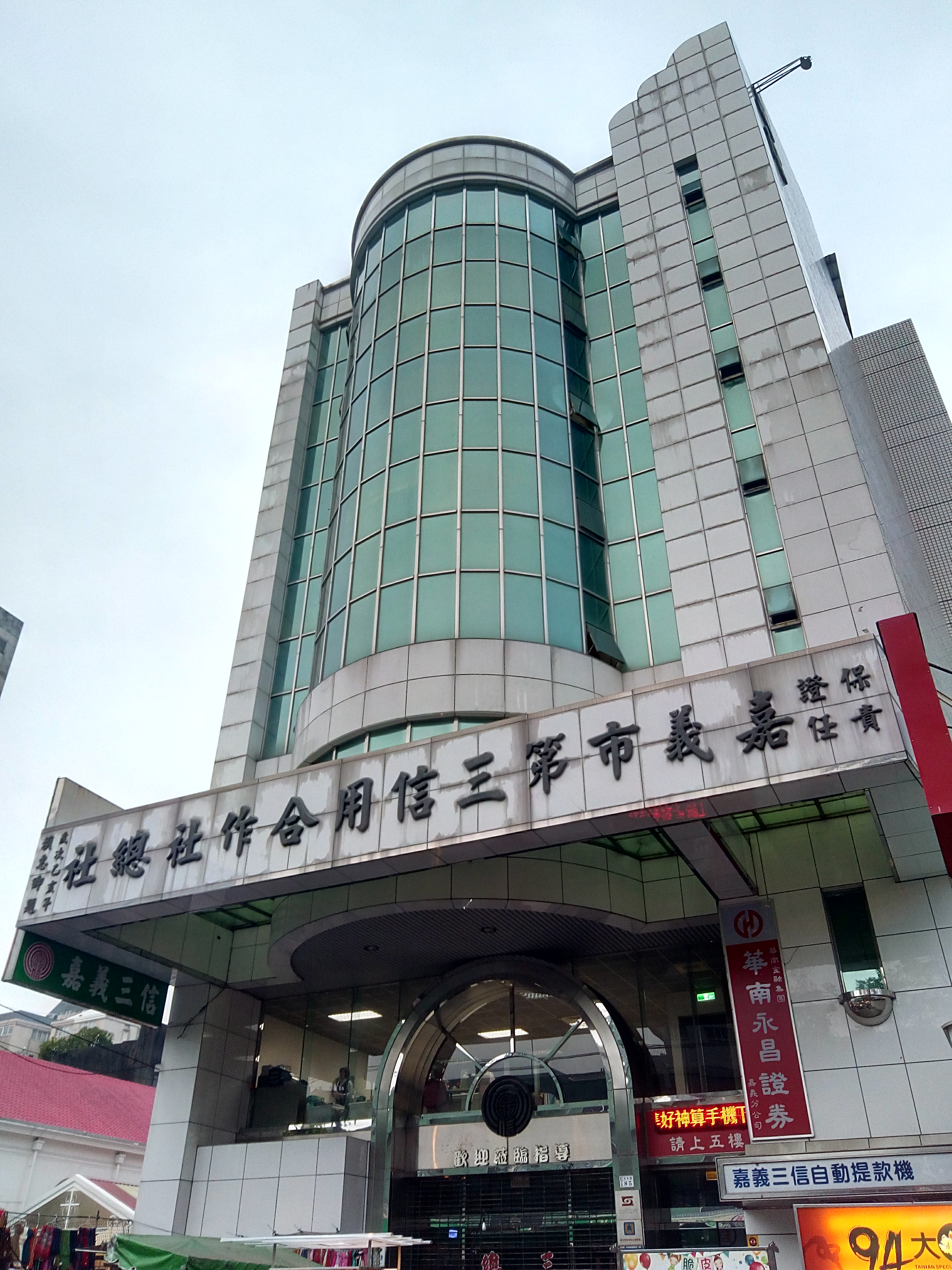 中文（台灣）: 嘉義市第三信用合作社總社，地址：嘉義市西區文化路85號。